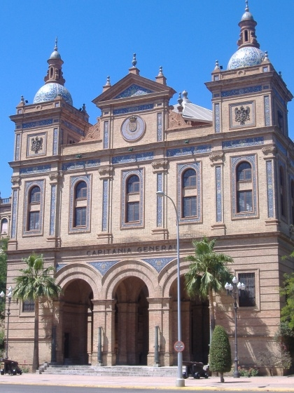 Capitanía General de Sevilla. Andalucía, España.